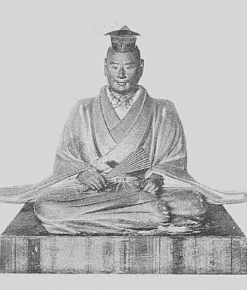 宇喜多直家（ukita naoie）